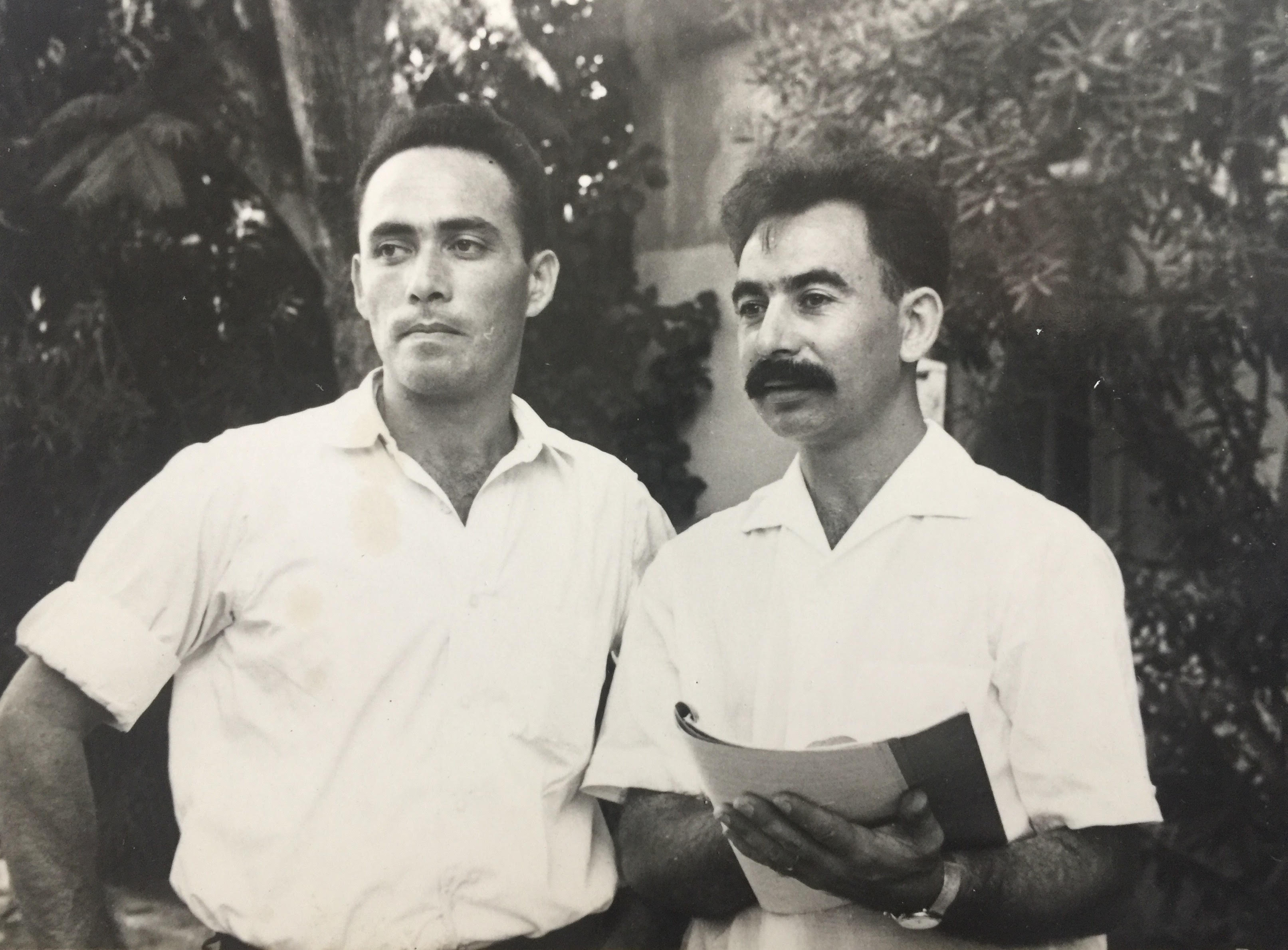 חיוני ופּוּצ׳וּ מביימים את ״אולי תרדו שם״